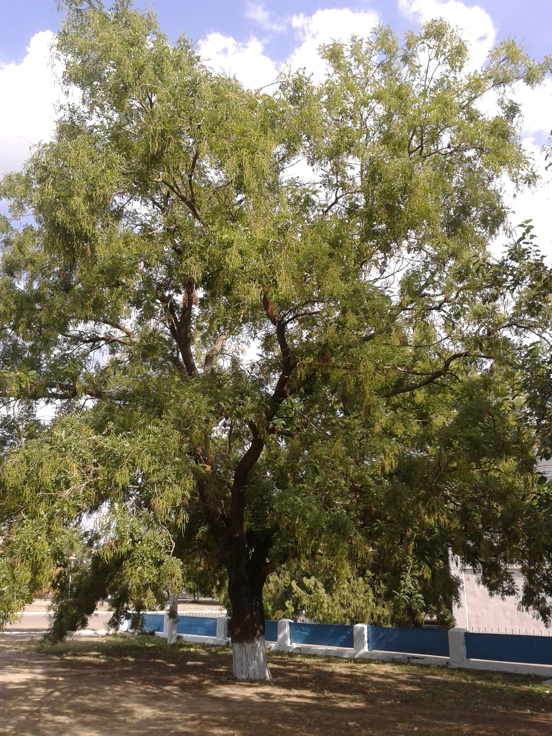 На світлині стара софра, котра розташована в Одеській області, Арцизькому районі, с. Делень у самому центрі села. Являє собою символ села. Посаджено софору у першій половині XIX століття.